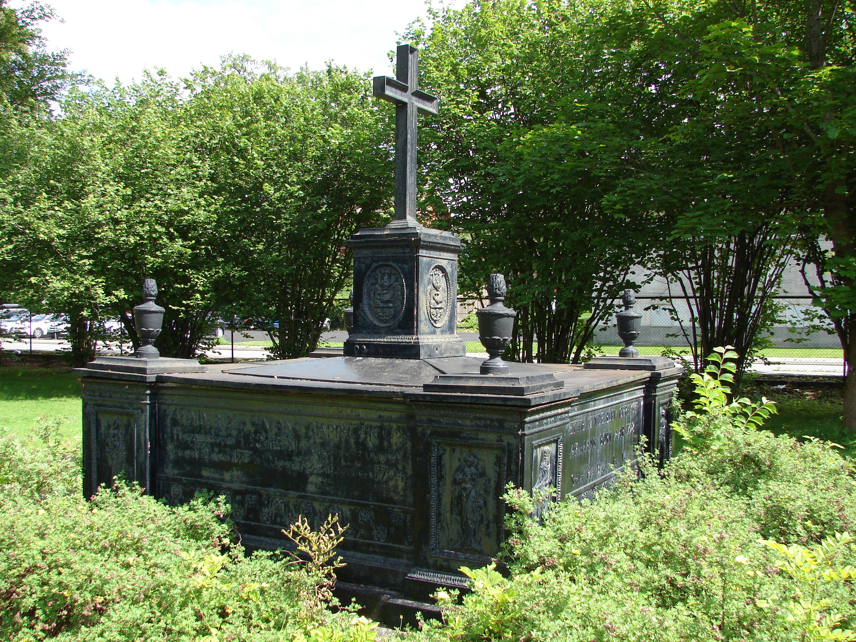 Diderich von Cappelens gravmonument fra Bærums Jernværk, Søndre Brekke Gård, Skien